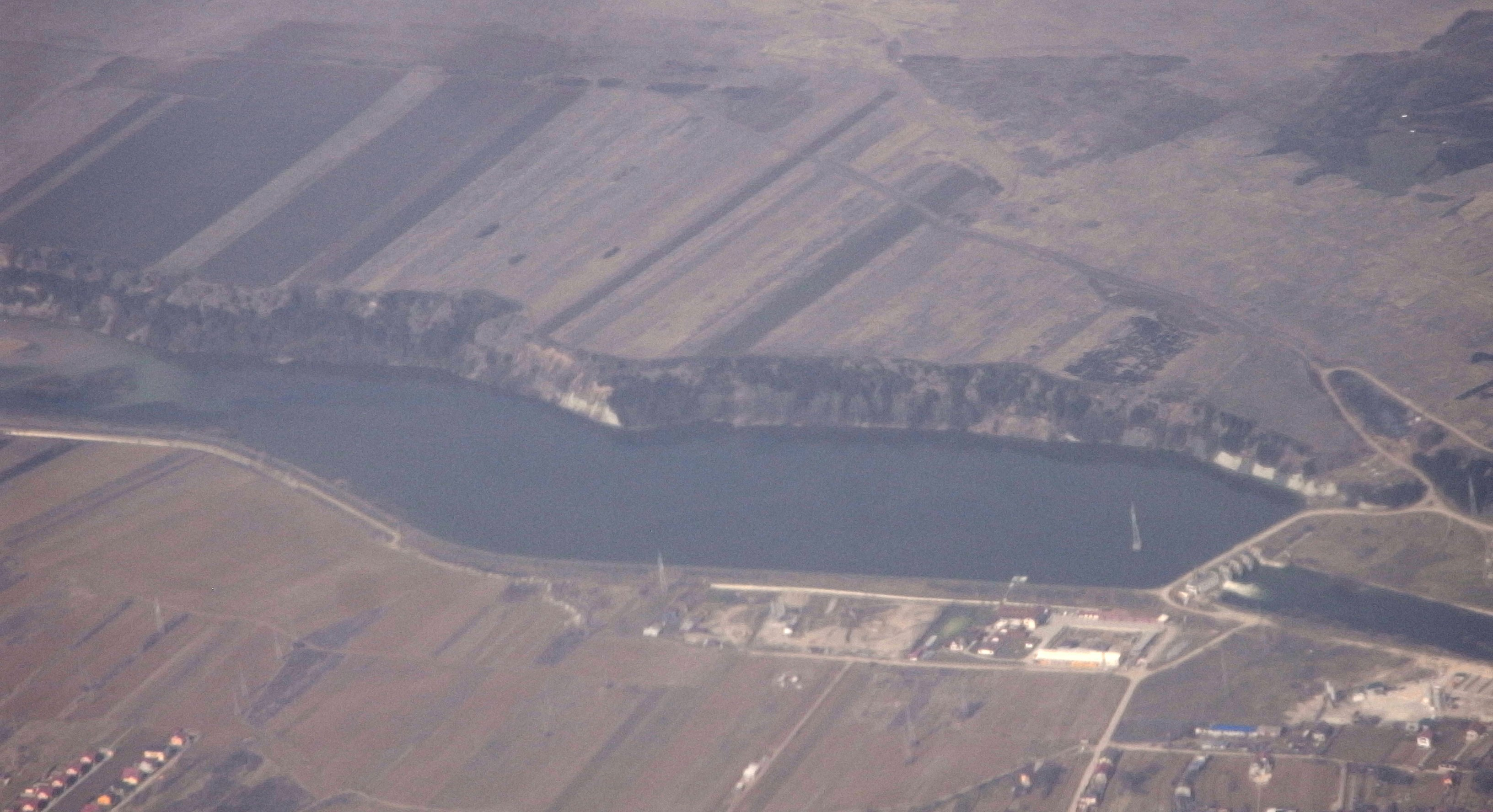 Baraĵlago de rivero Someșul Mic ĉe Florești.